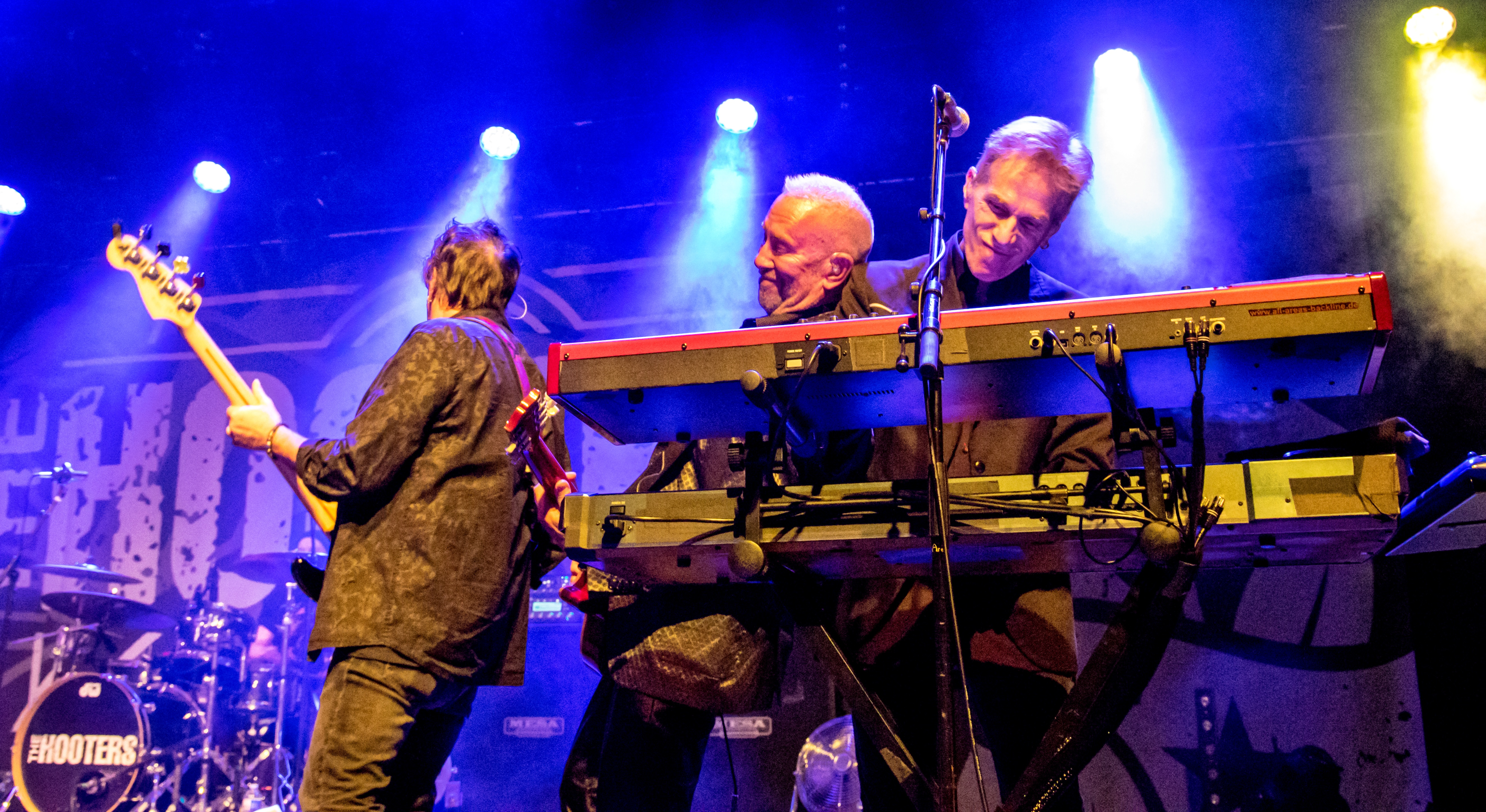 Bilder vom Zelt Musik Festival 2018 in Freiburg im Breisgau Auftritt The Hooters am 26. Juli 2018 im Zirkuszelt